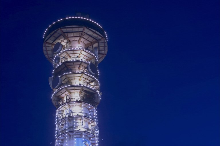 Torre panorâmica Brasil Telecom(Brasil Telecom Panoramic Tower), Curitiba, Paraná, Brasil